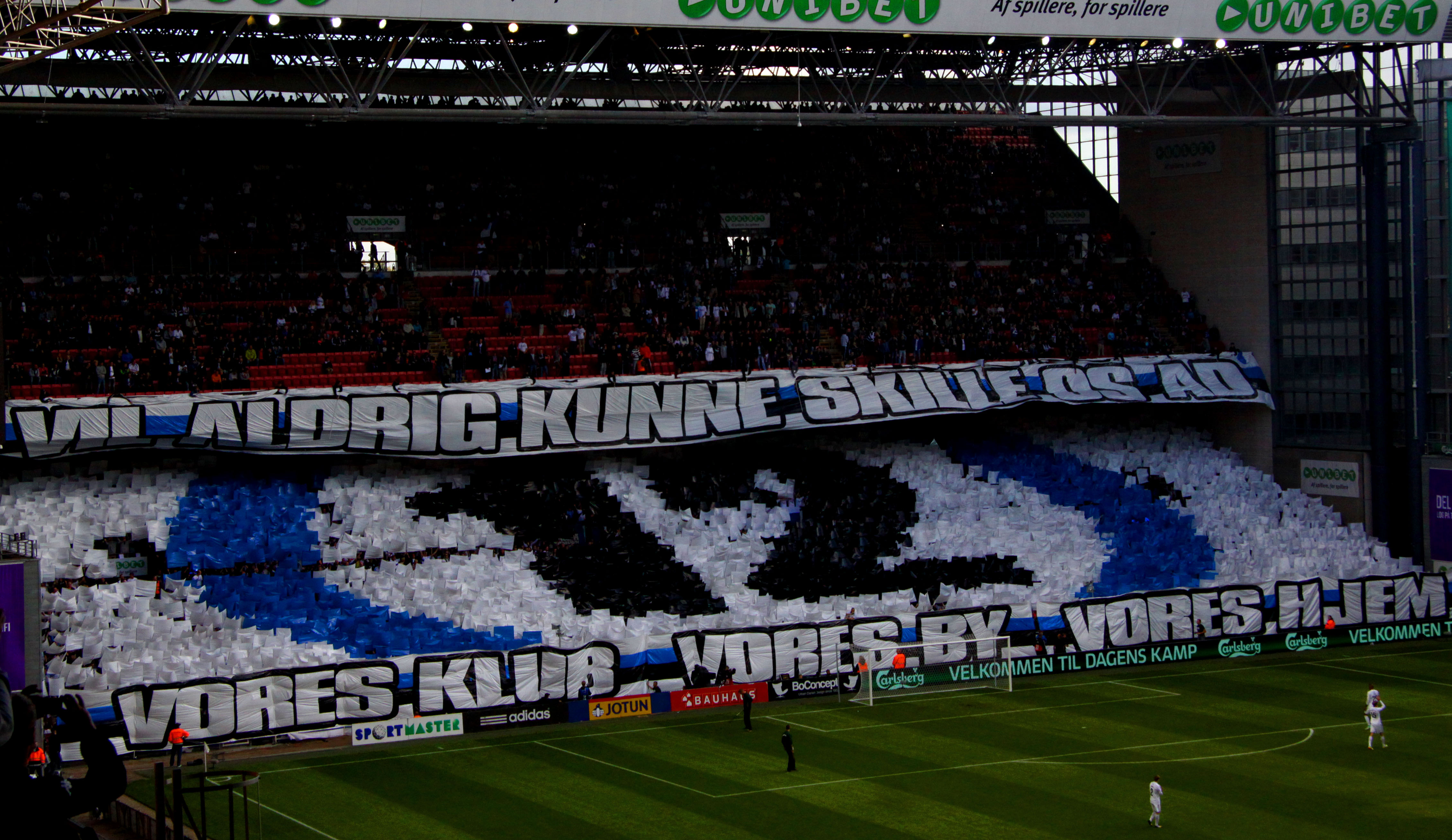 København / Copenhagen. FCK - Brøndby i Parken.